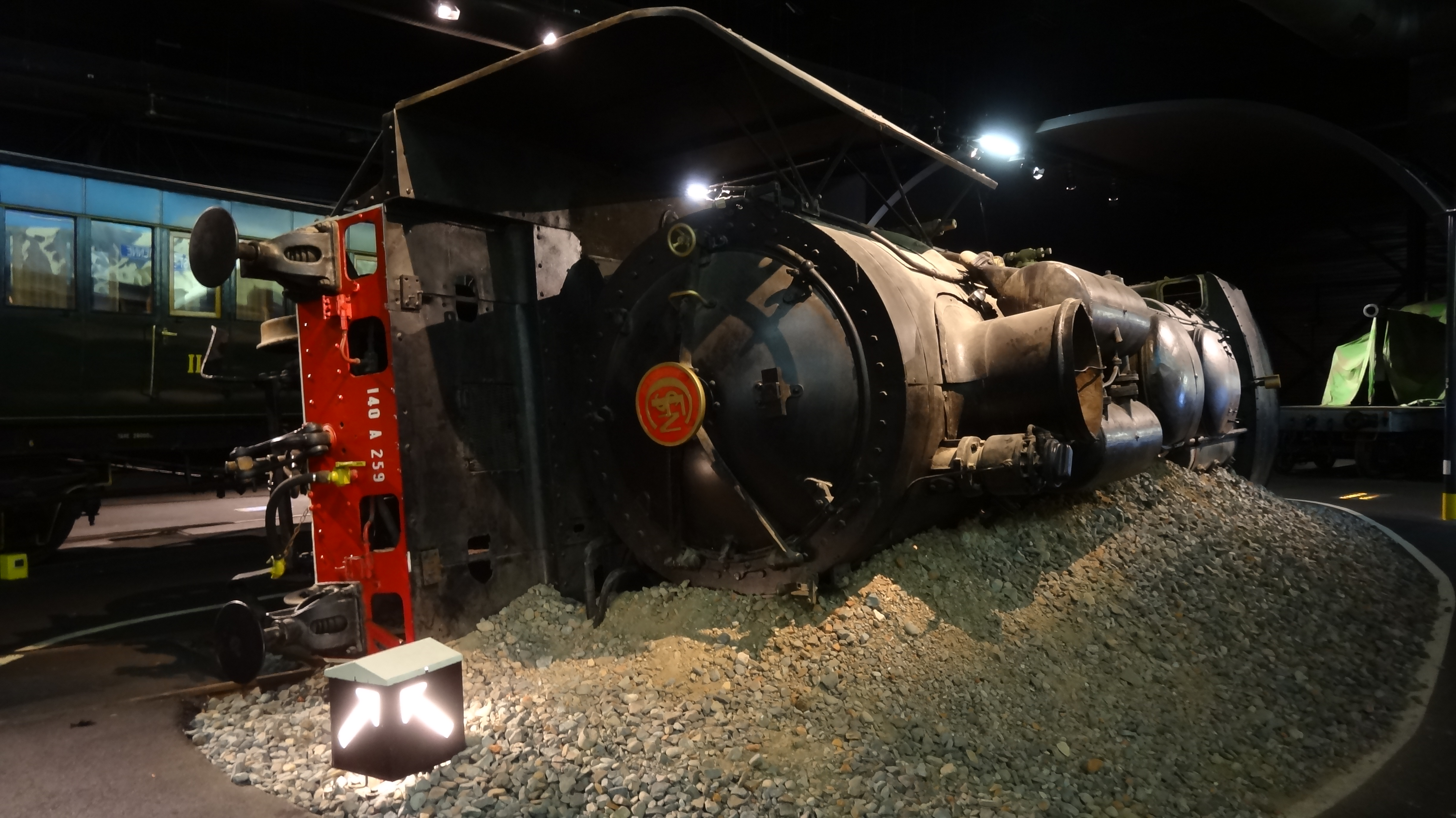 Cite du Train Mulhouse 2014 026